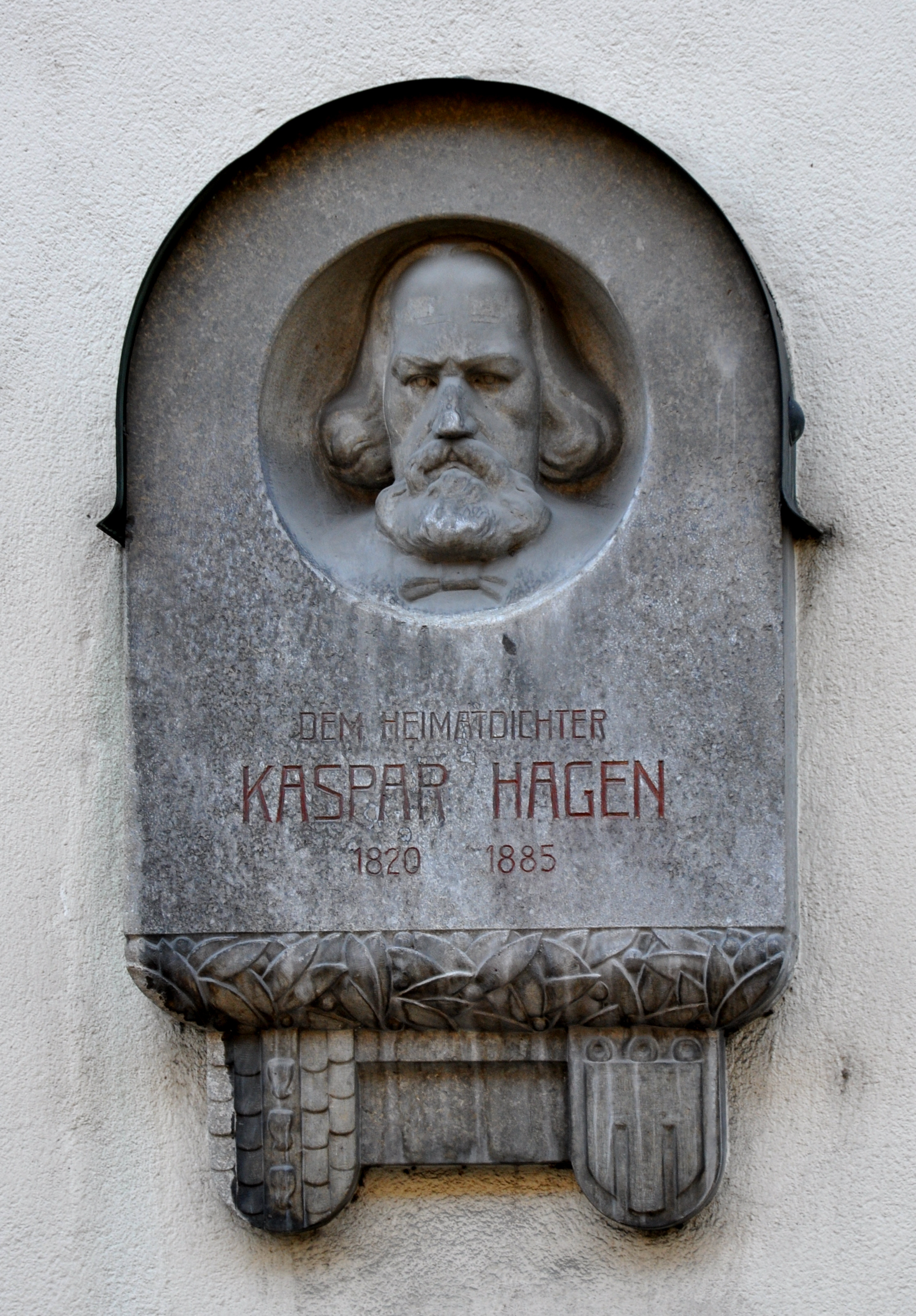 Bregenz, Seekapelle, Gedenkstein für den Heimatdichter Kaspar Hagen